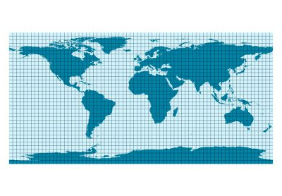 Zylinderprojektion quadratische Plattkarte